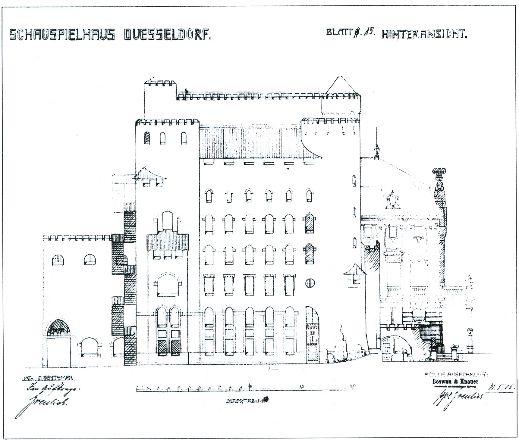 Düsseldorf, Schauspielhaus an der Karl-Theodor-Straße, erbaut von Sehring 1905, Aufrisszeichnung